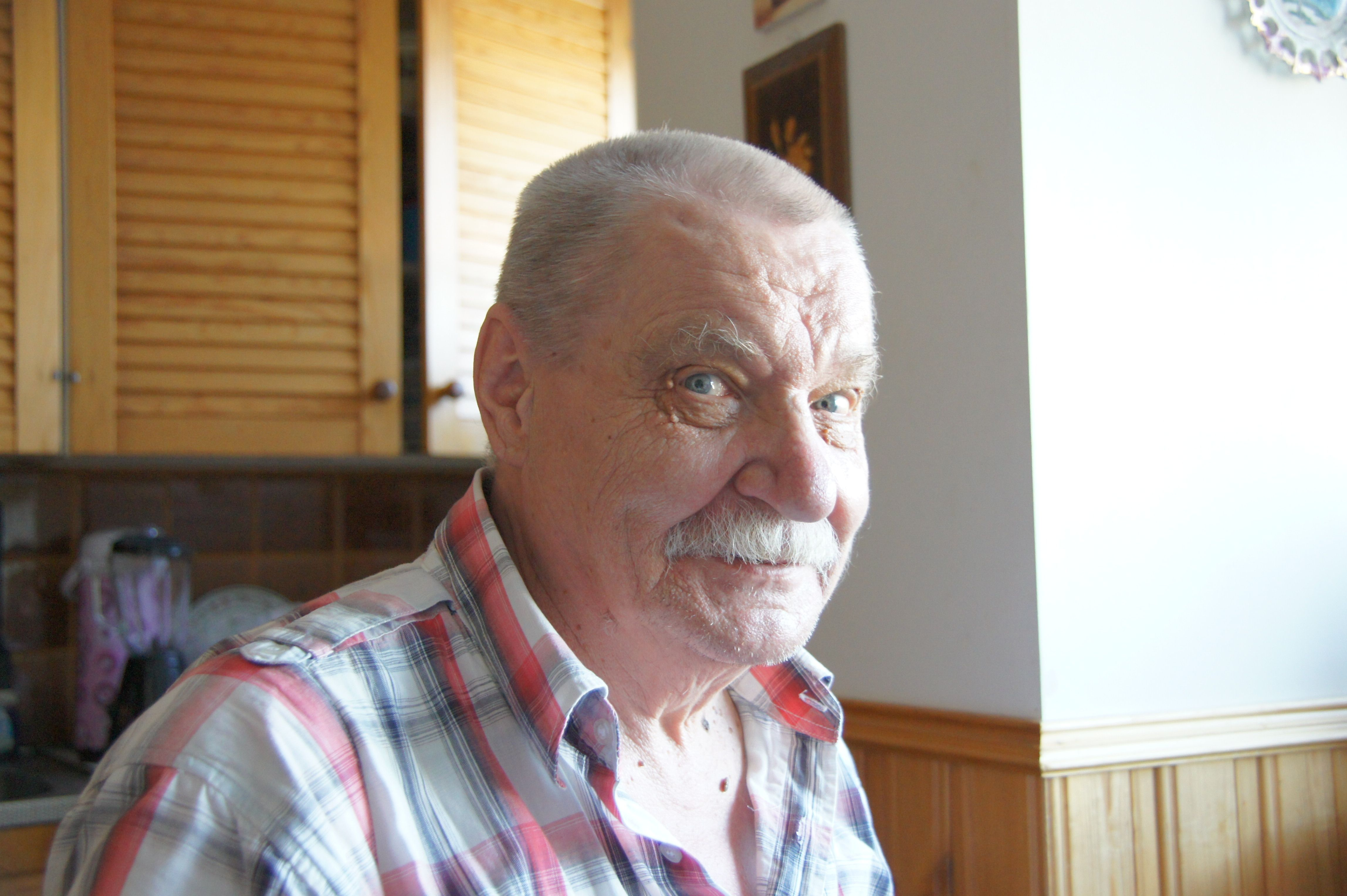 Поэт Роберт Иванович Винонен.